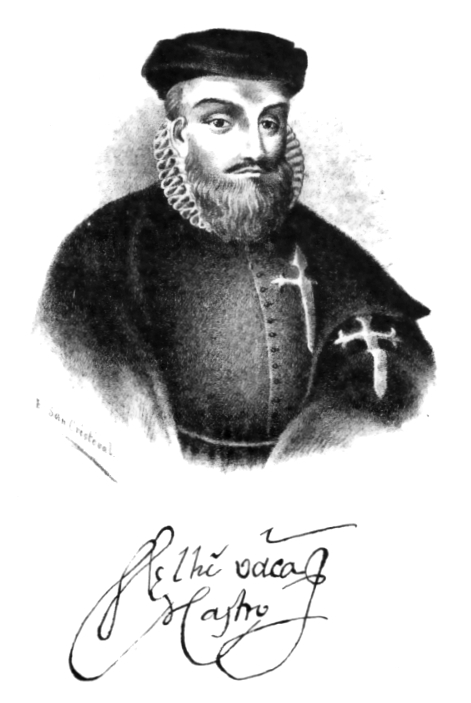 Cristóbal Vaca de Castro (1492 - 1566) gobernador español del Perú entre 1542 y 1544.